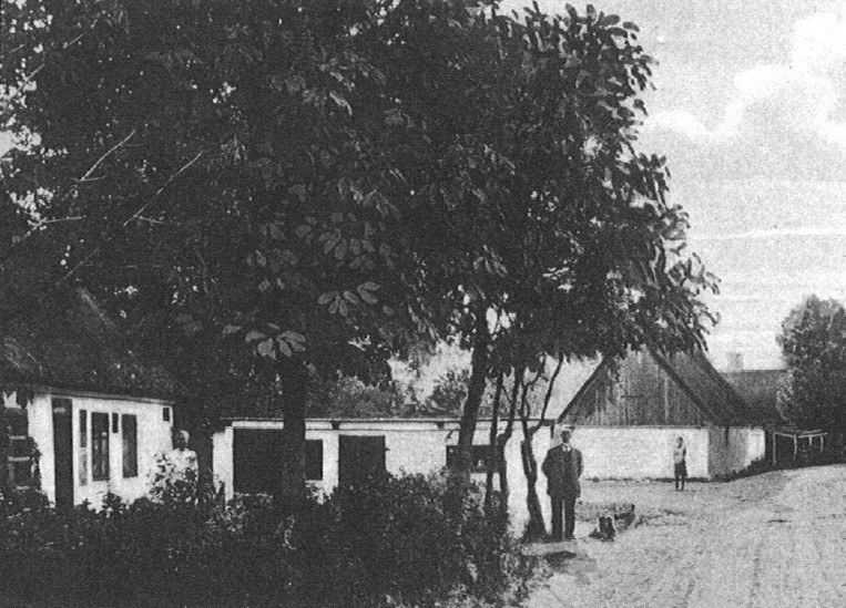 Photograph from Vridsløsemagle, Denmark, 1905